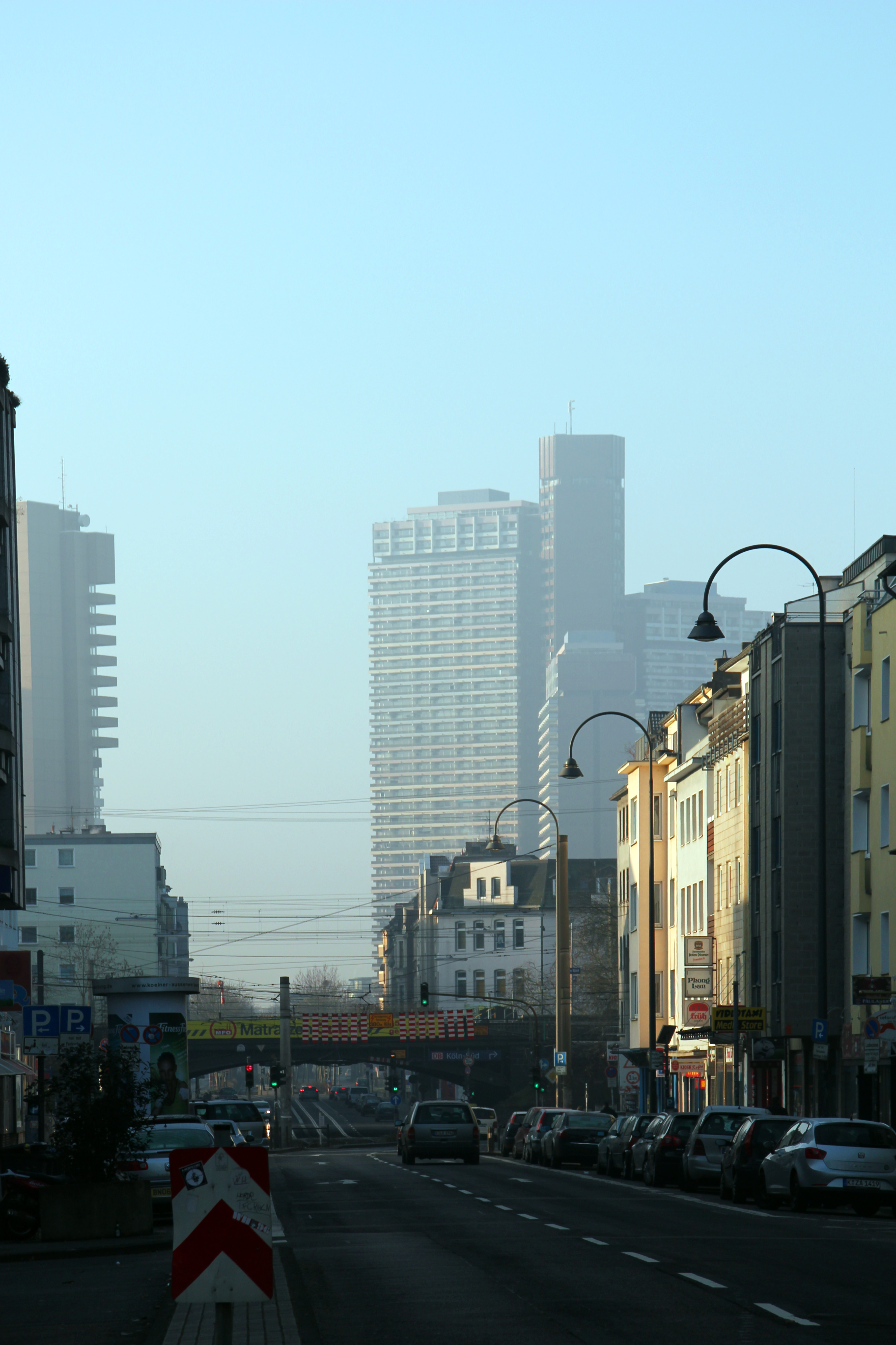 Köln, Luxemburger Straße ab Barbarossaplatz . Im Hintergrund Unicenter und Gerichtsgebäude